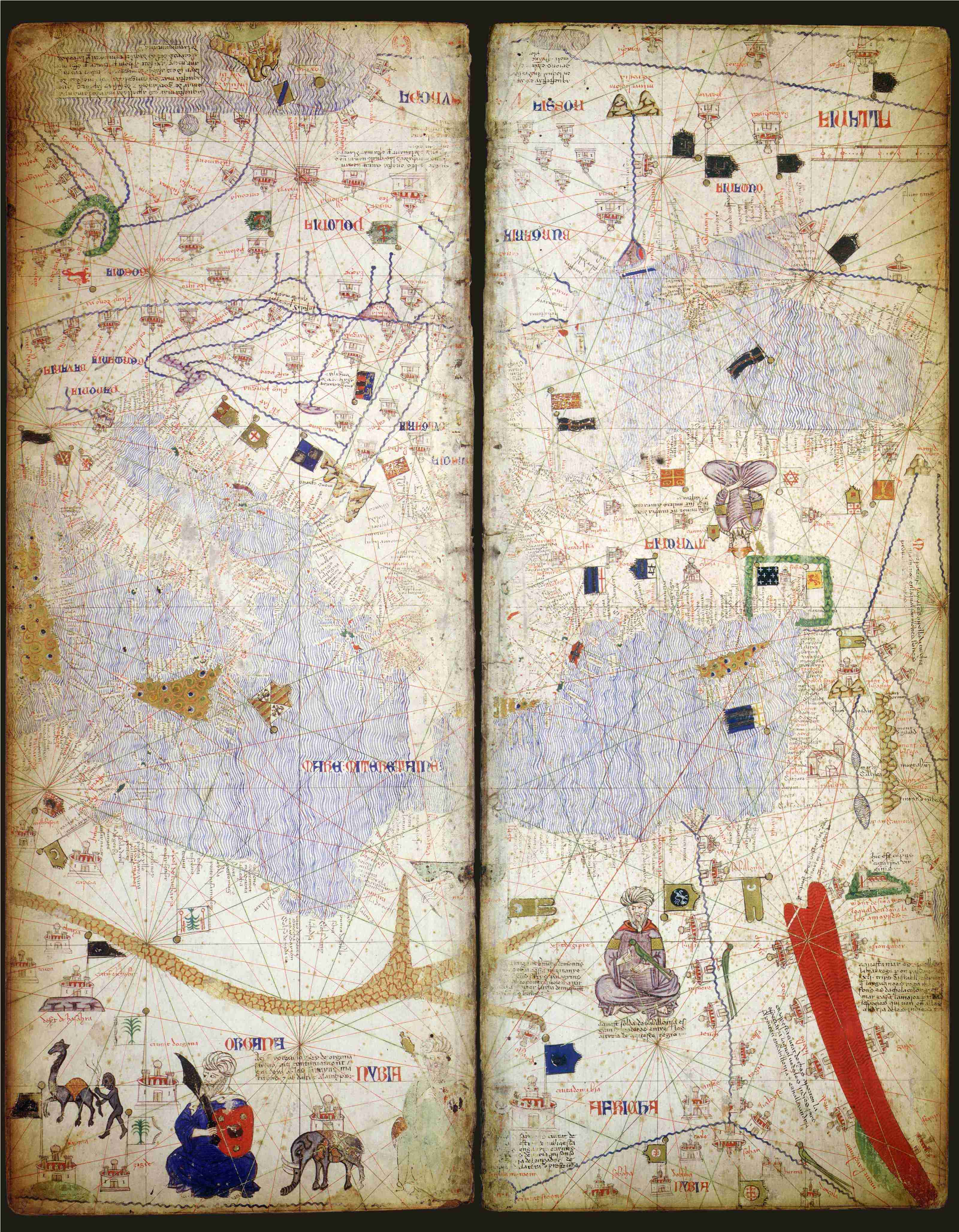 Mediterrani oriental